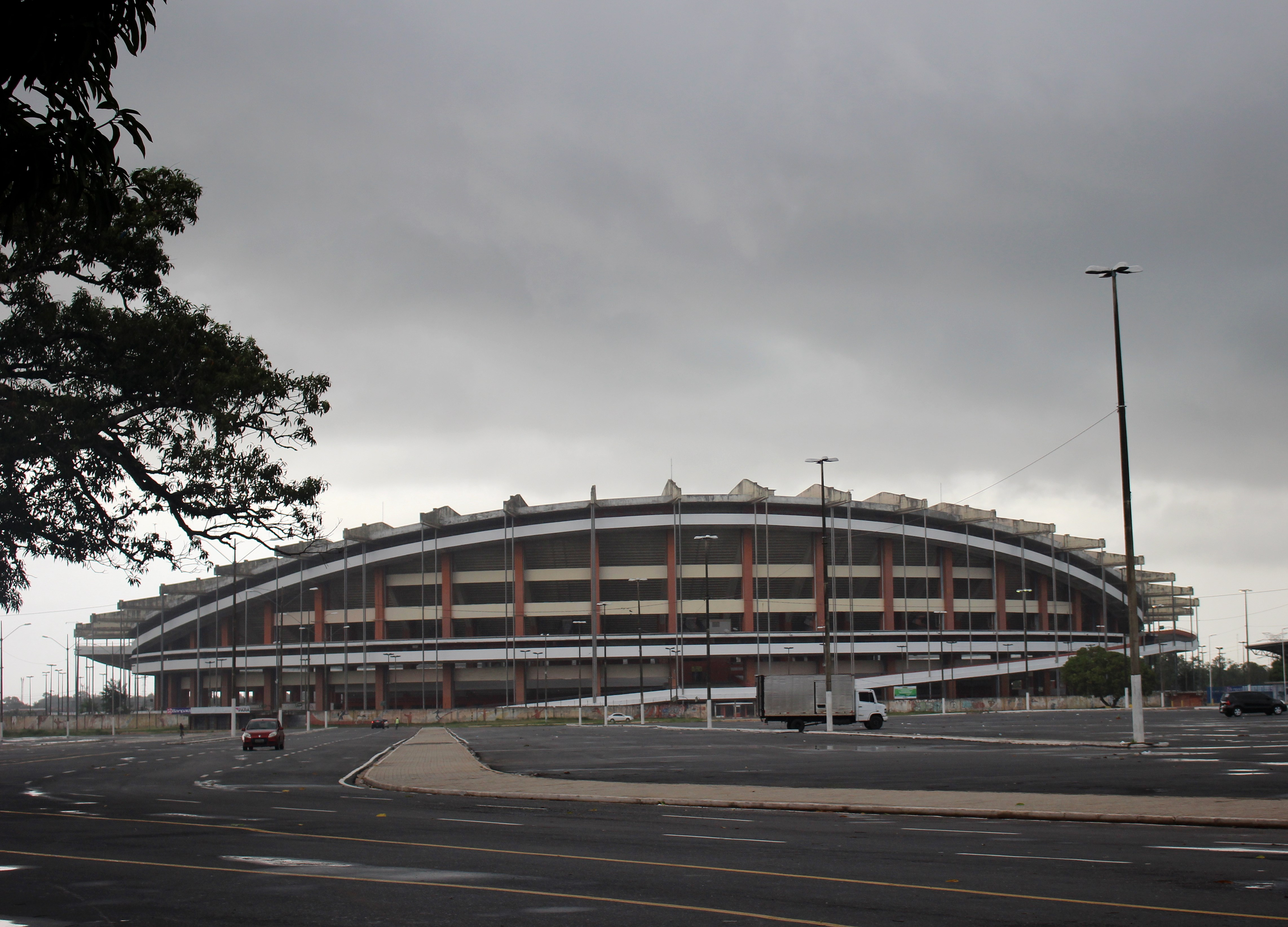 Estádio visão externa a partir do estacionamento em 2017.